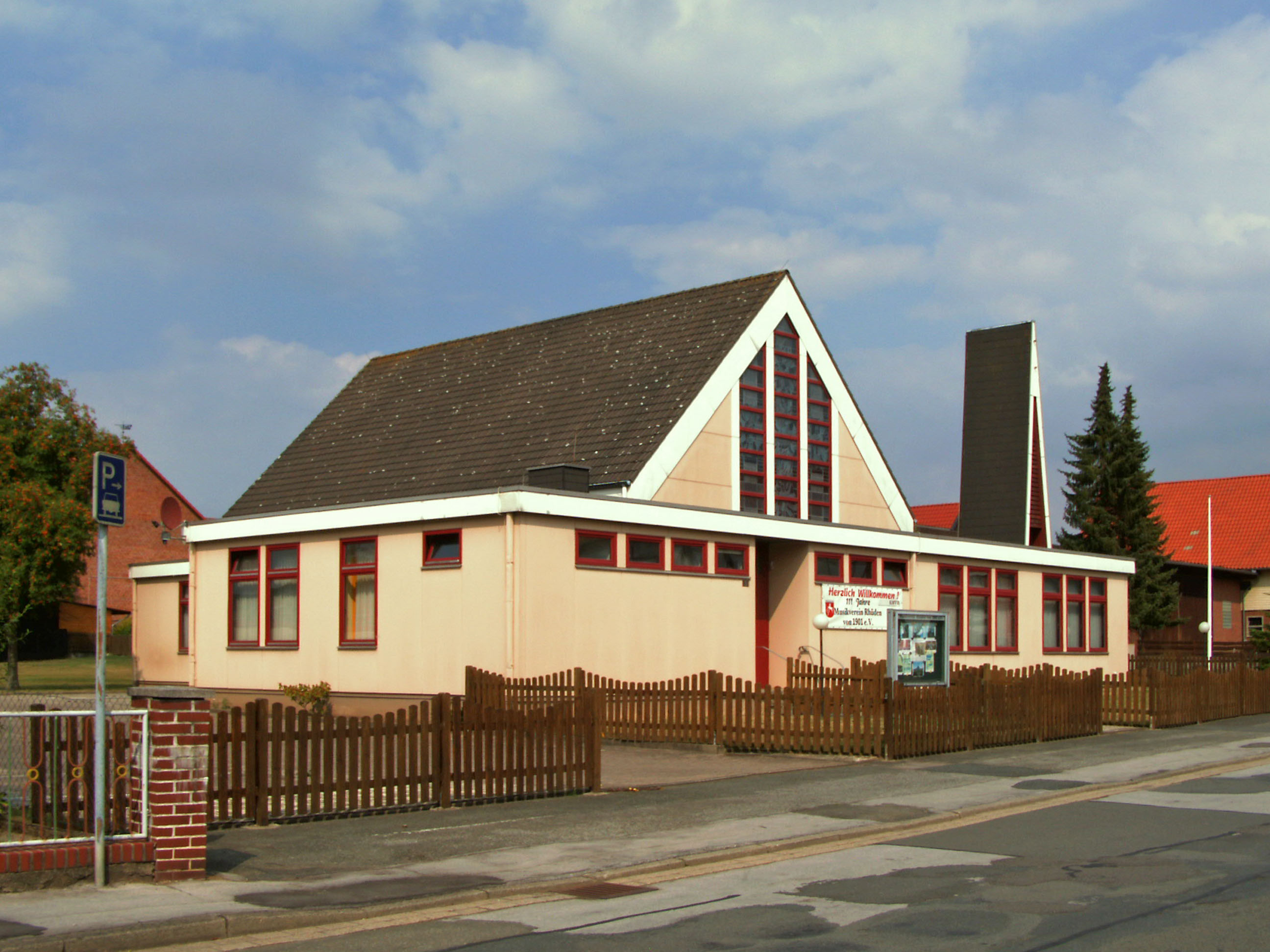 Vereinsheim des Musikvereins in Rhüden, Ortsteil von Seesen am Harz (ehemalige katholische St.-Oliver-Kirche)